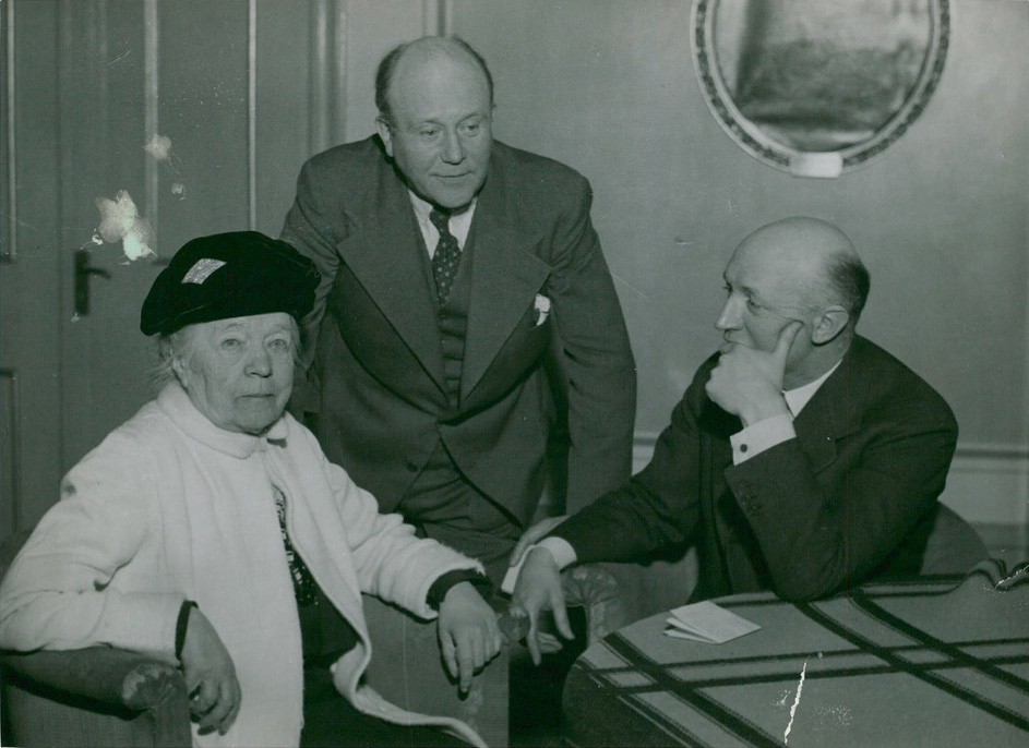 Före premiären på Gösta Berling på Dramaten. Selma Lagerlöf, regissör Rune Carlsten (i mitten) och Olof Molander. Införd i Svenska Dagbladet 1936-02-21.